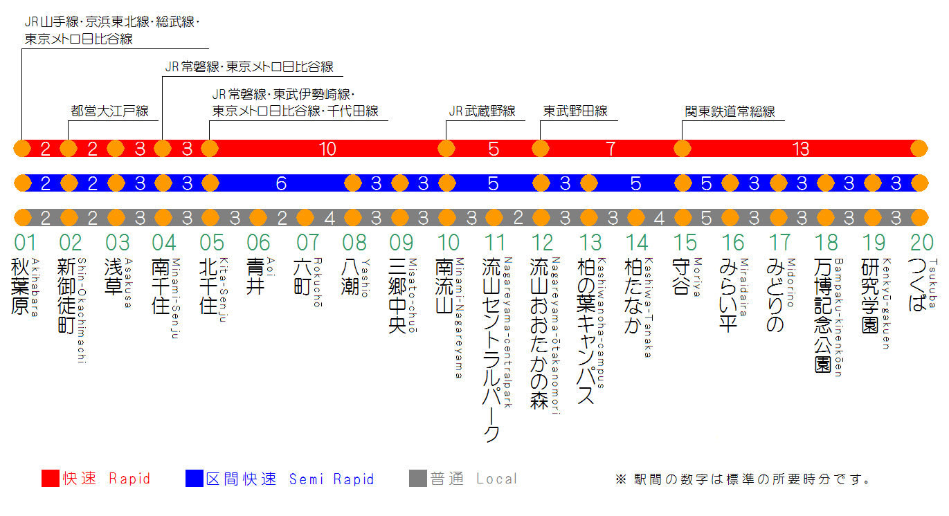 つくばエクスプレスの路線図